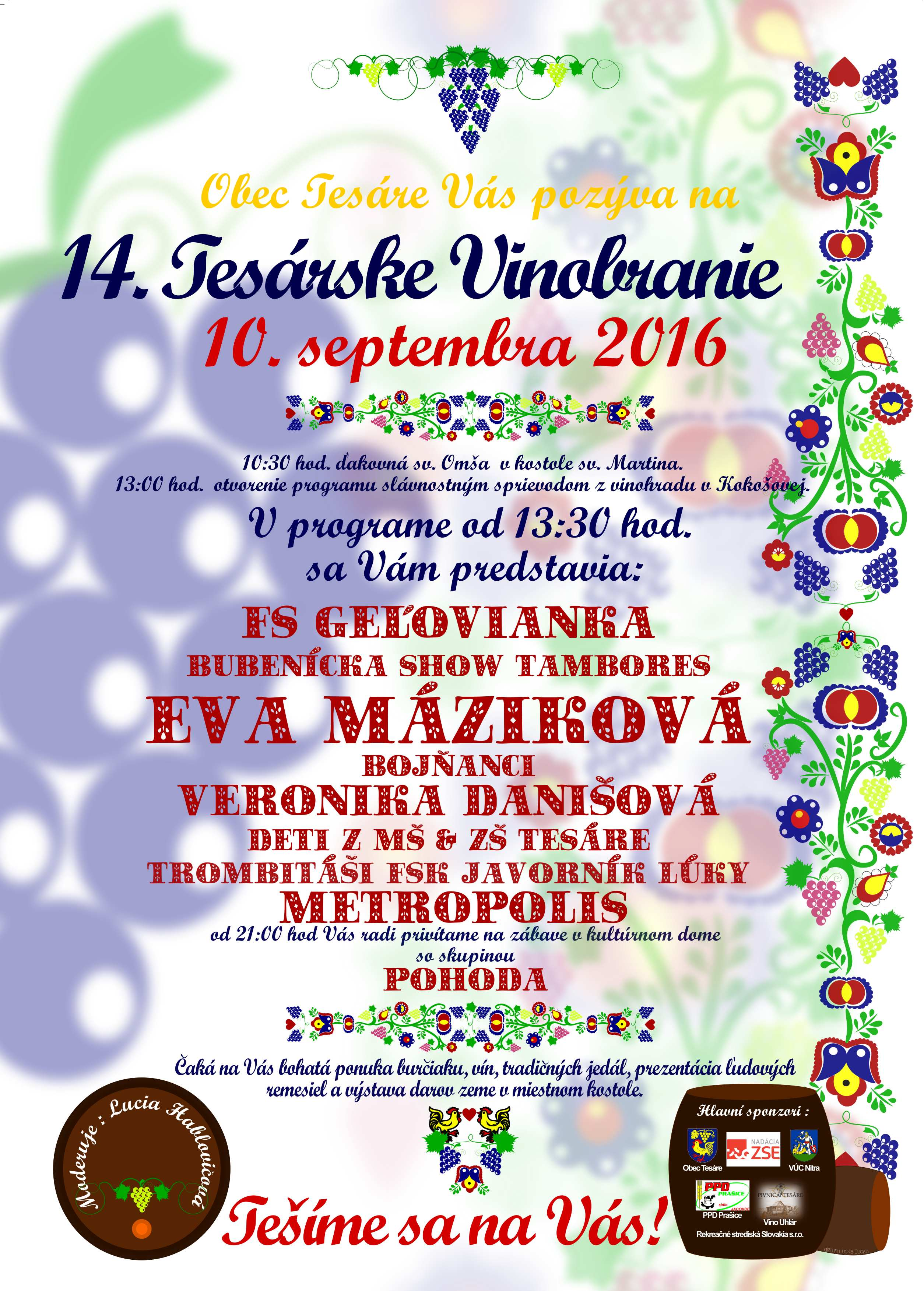 Plagát k 14.ročníku tradičného Vinobrania.